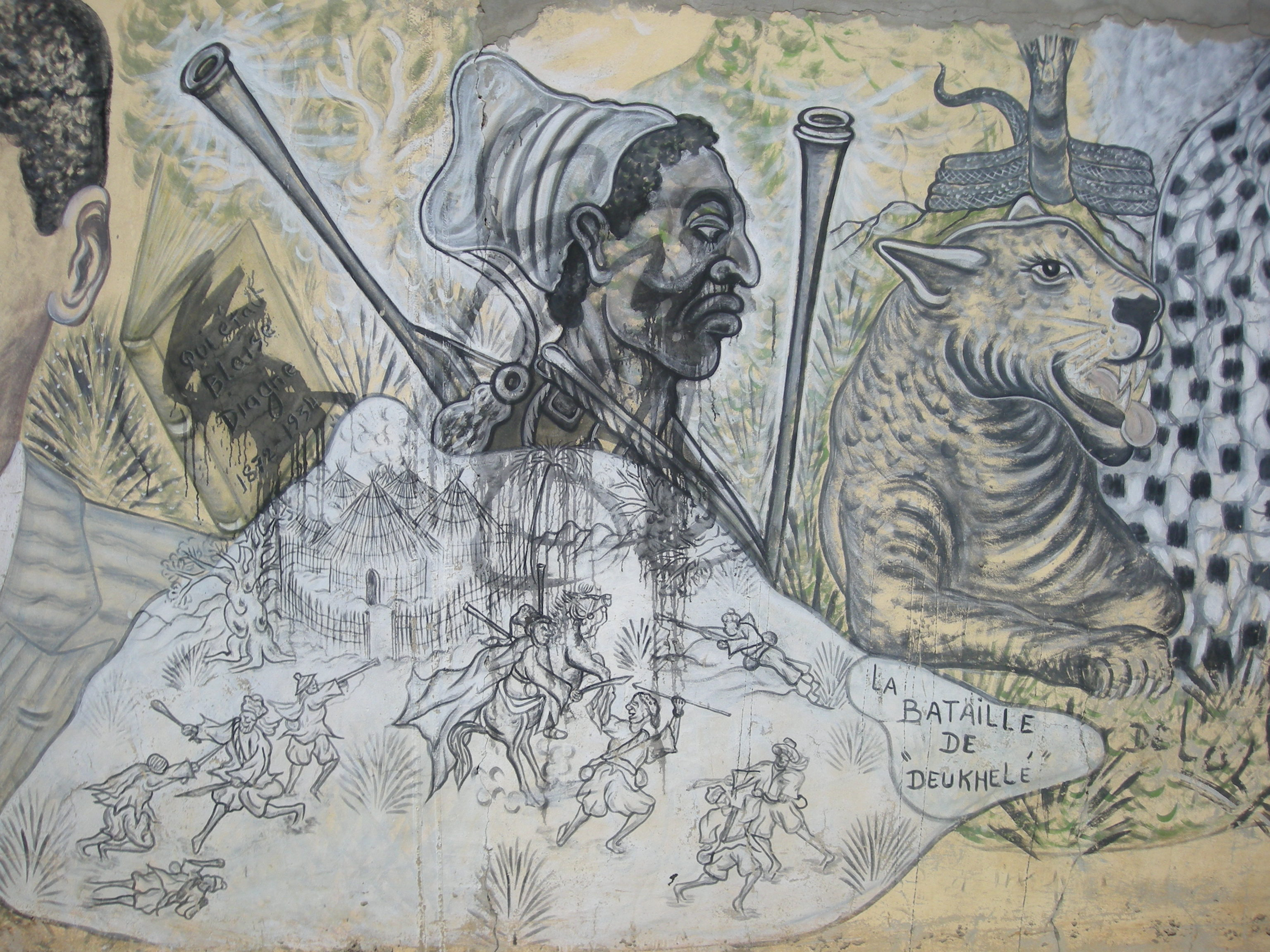 Fresque sur le mur d'une usine à Bel-Air, un quartier de Dakar (Sénégal)